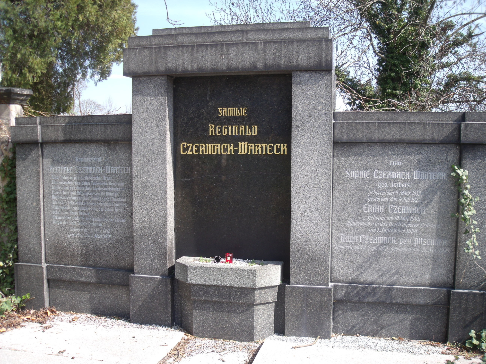 Hrobka Reginalda Czermacka, prezidenta Celorakouského hasičského svazu, který část svého života strávil v Teplicích